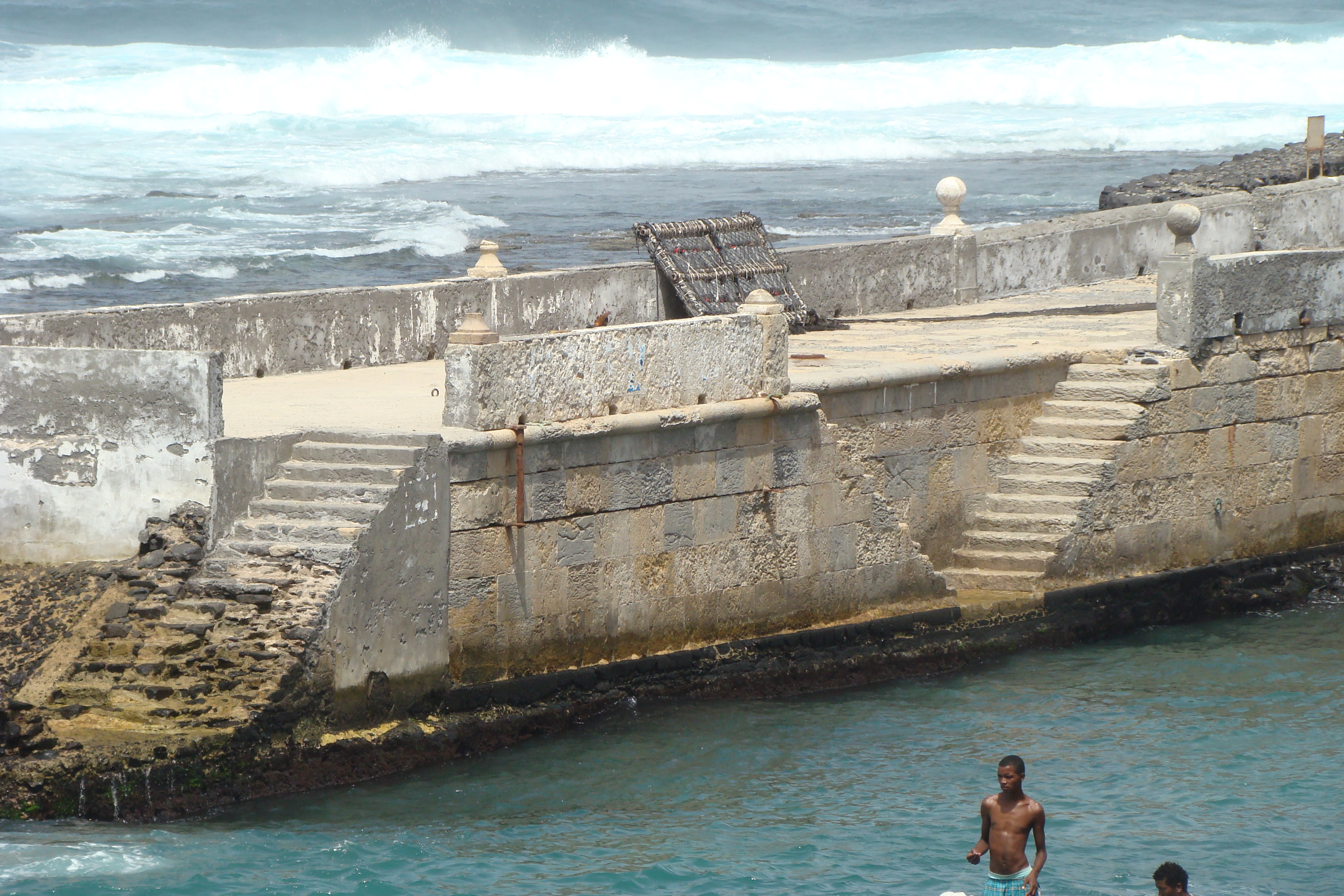 Muelle en la bocana del puerto de Ponta do Sol (Boca da Pistola)